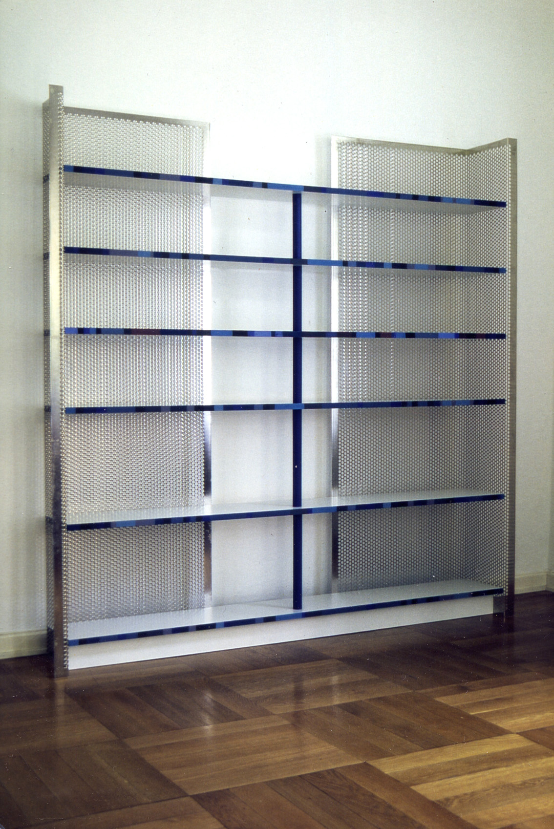 Hermann Waldenburg, Ablage/Regal, Stahl, Glas, Höhe: 134 cm, Breite: 100 cm, Tiefe: 46 cm